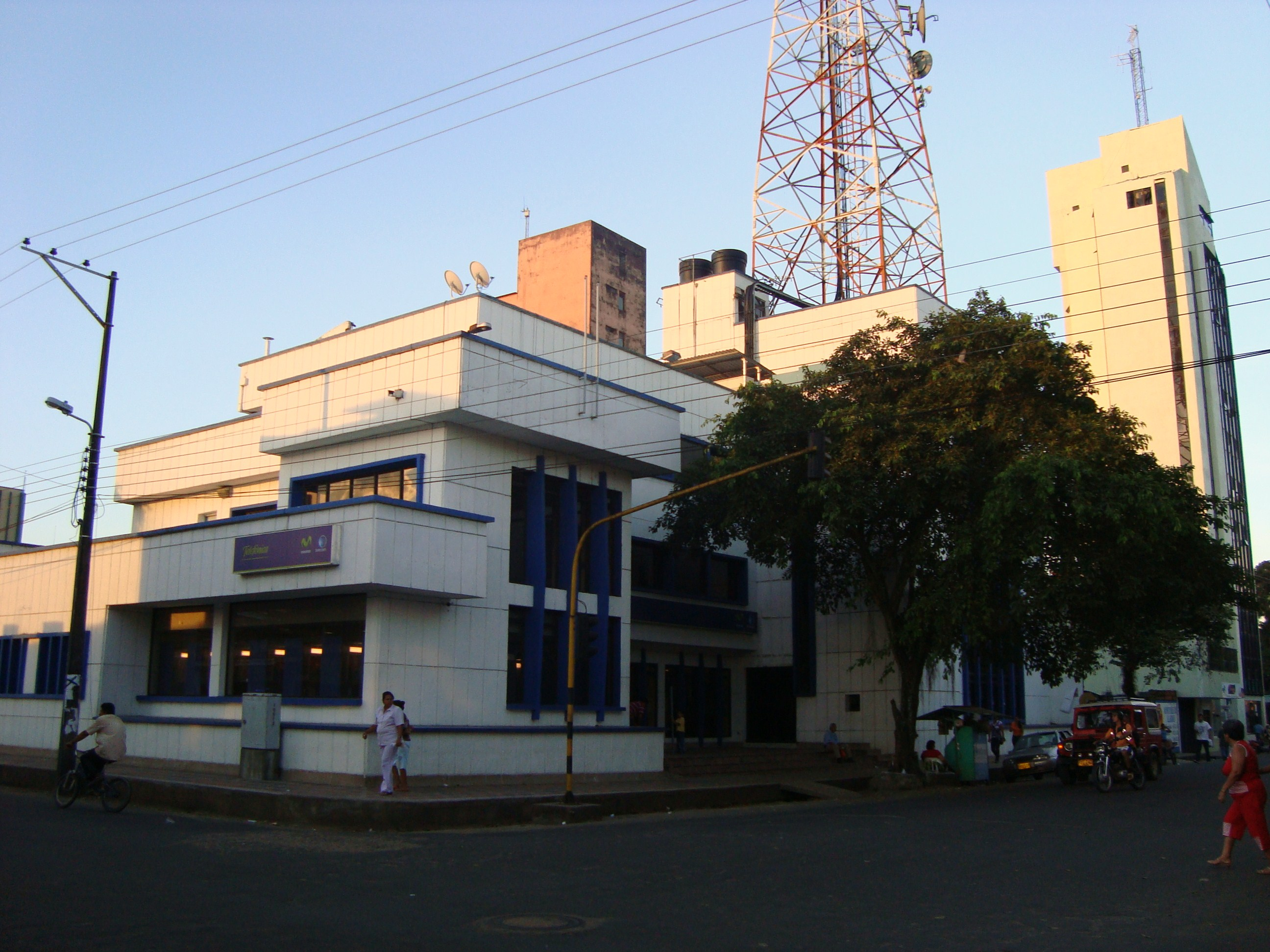 Sede de Telefónica (Telecom y Movistar) en Florencia (Caquetá).